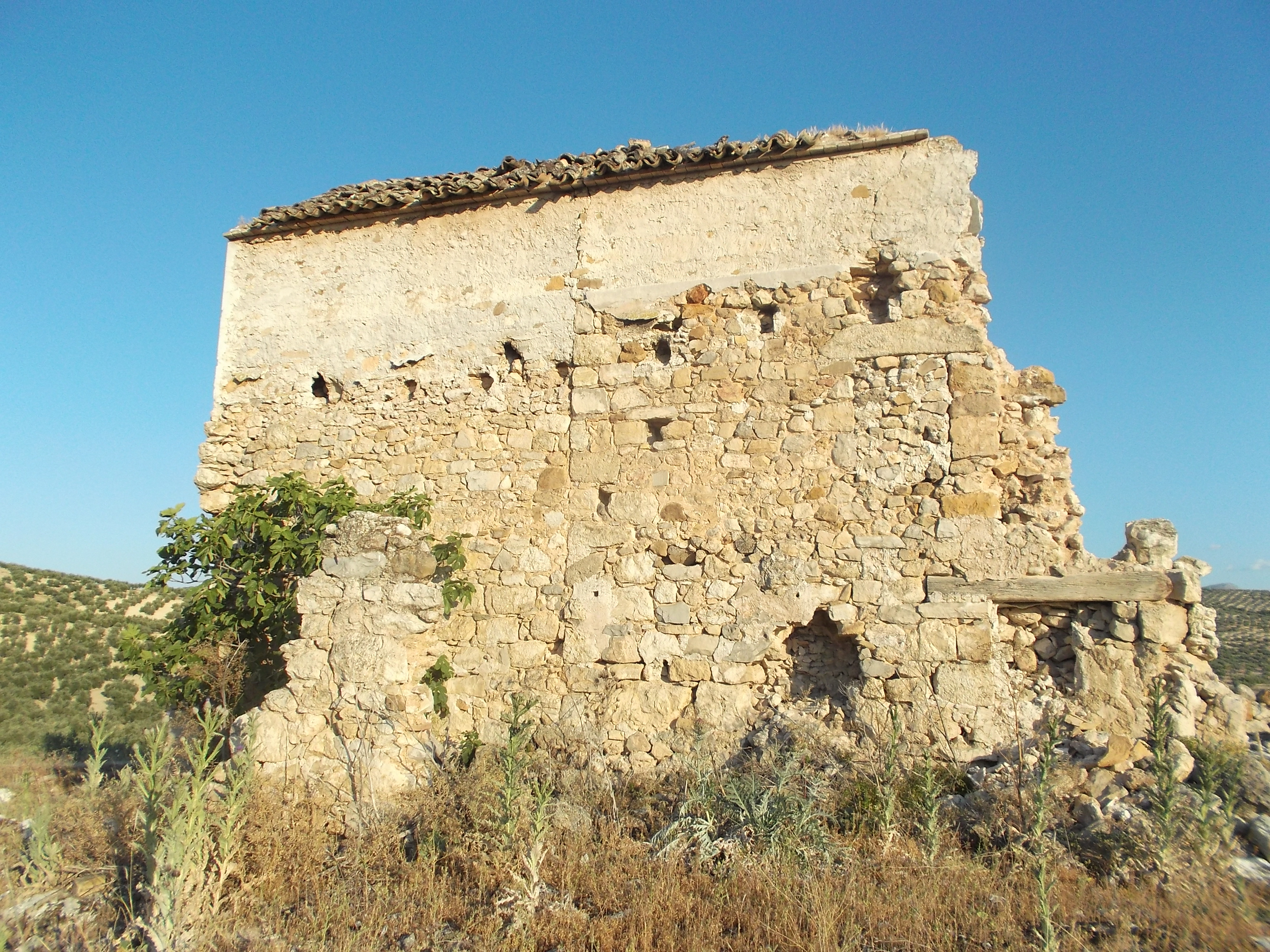 Vistas de la torre de Casa Fuerte